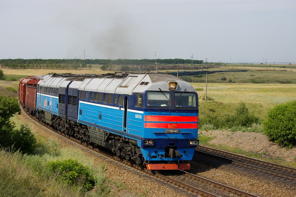 Тепловоз 2ТЭ116У-0012 с поездом около Белой Калитвы